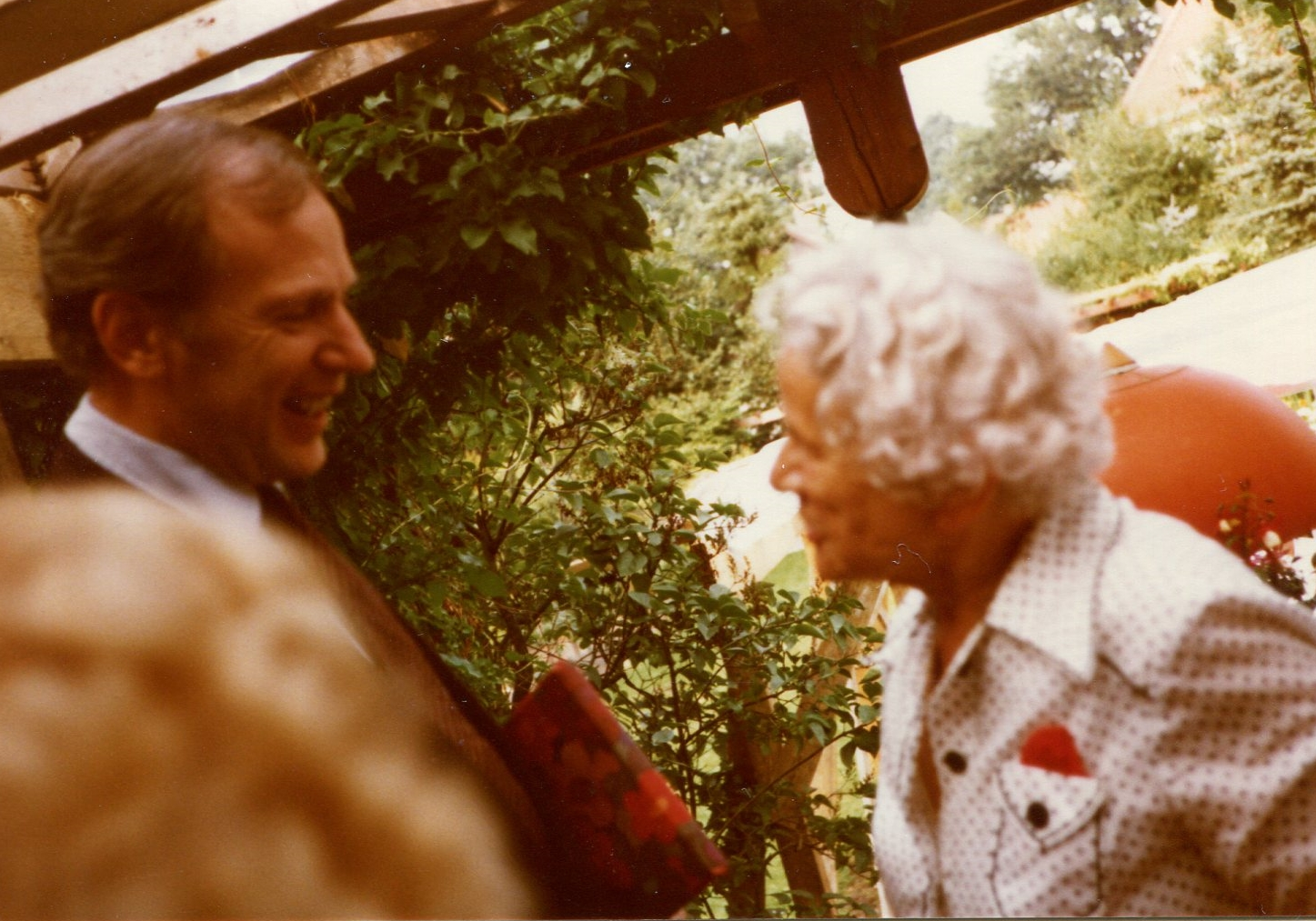 Hamburgs Bürgermeister Klaus von Dohnanyi gratuliert der 80jährigen Schneiderin Minna Lühr im Garten des denkmalgeschützten Reihenhauses Stübekamp 75 in der Frank'schen Siedlung zum Geburtstag